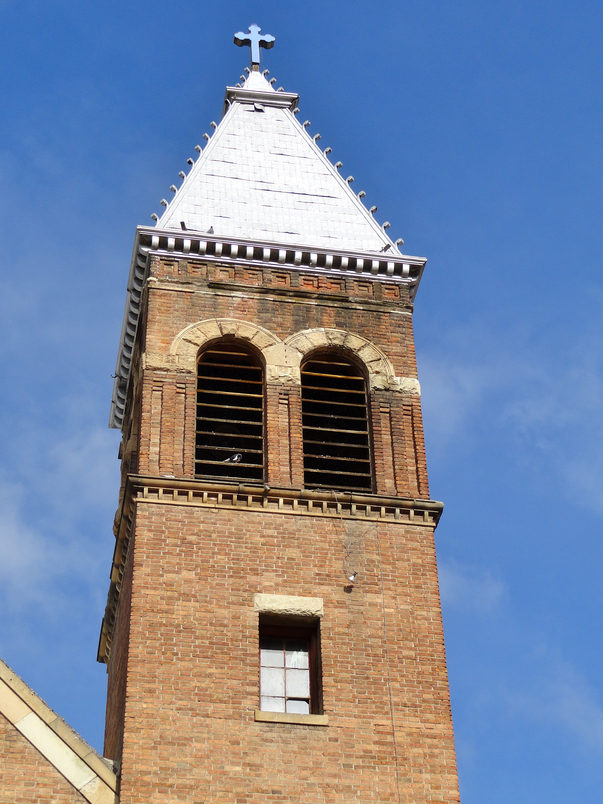 Templo Metodista Episcopal